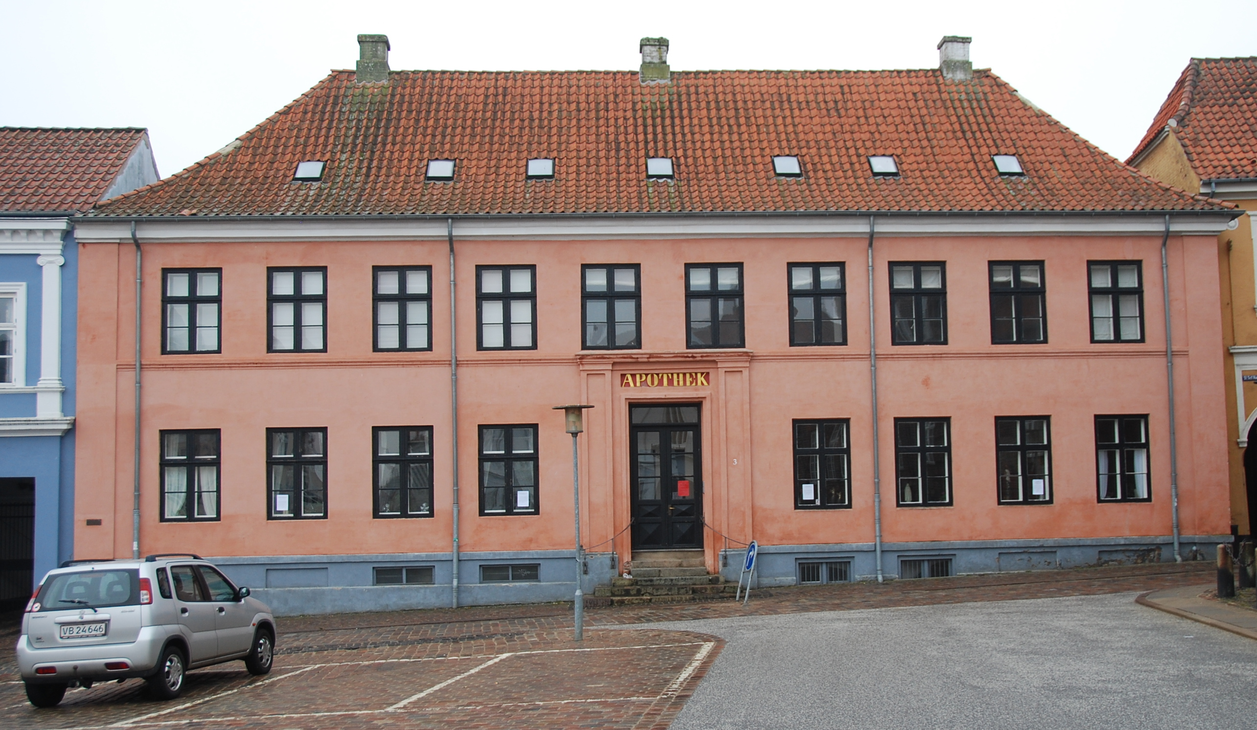 Den fredede bygning "Svaneapoteket" på Nytorv i Viborg.